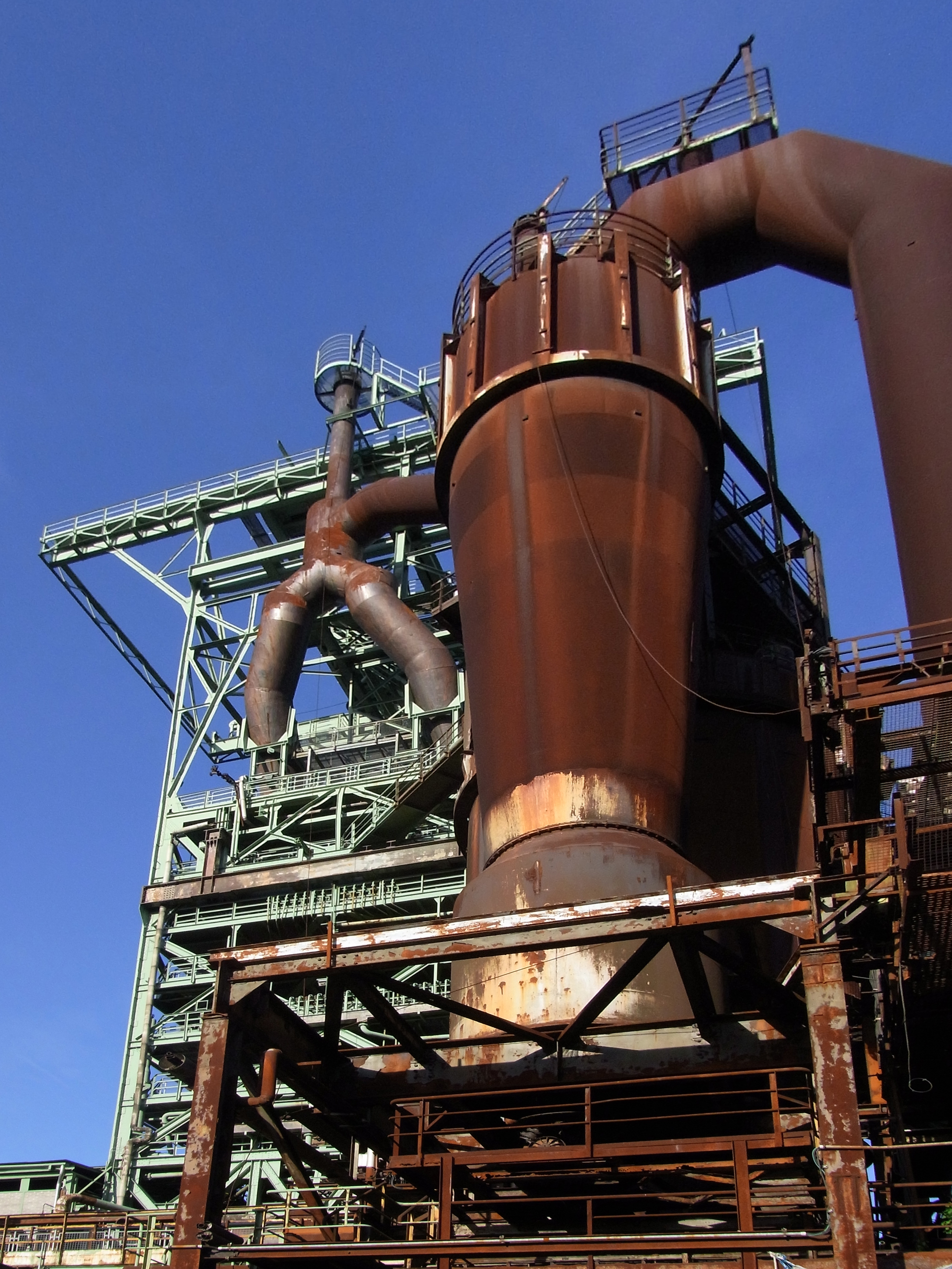 Westfälisches INdustriemuseum, Standort Henrichshütte in HattingenThis is a photograph of an architectural monument., no. 0